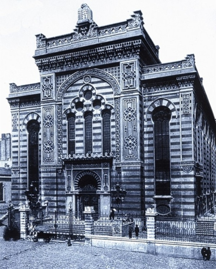 Synagoga Alte Szil w Łodzi przed zniszczeniem przez Niemców.